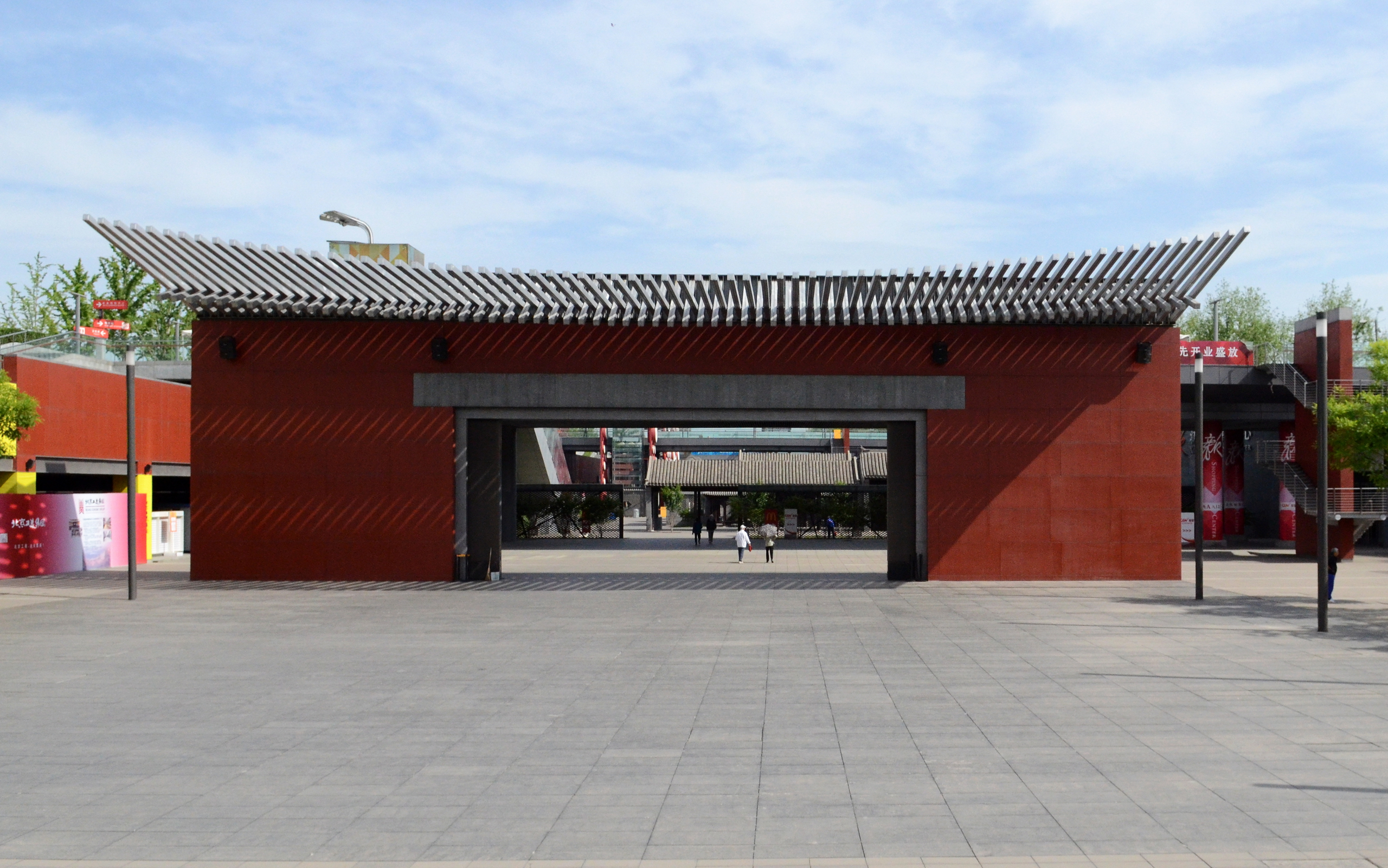 中文（中国大陆）: 位于北京奥林匹克公园中部奥林匹克公园下沉花园的1号院“御道宫门”